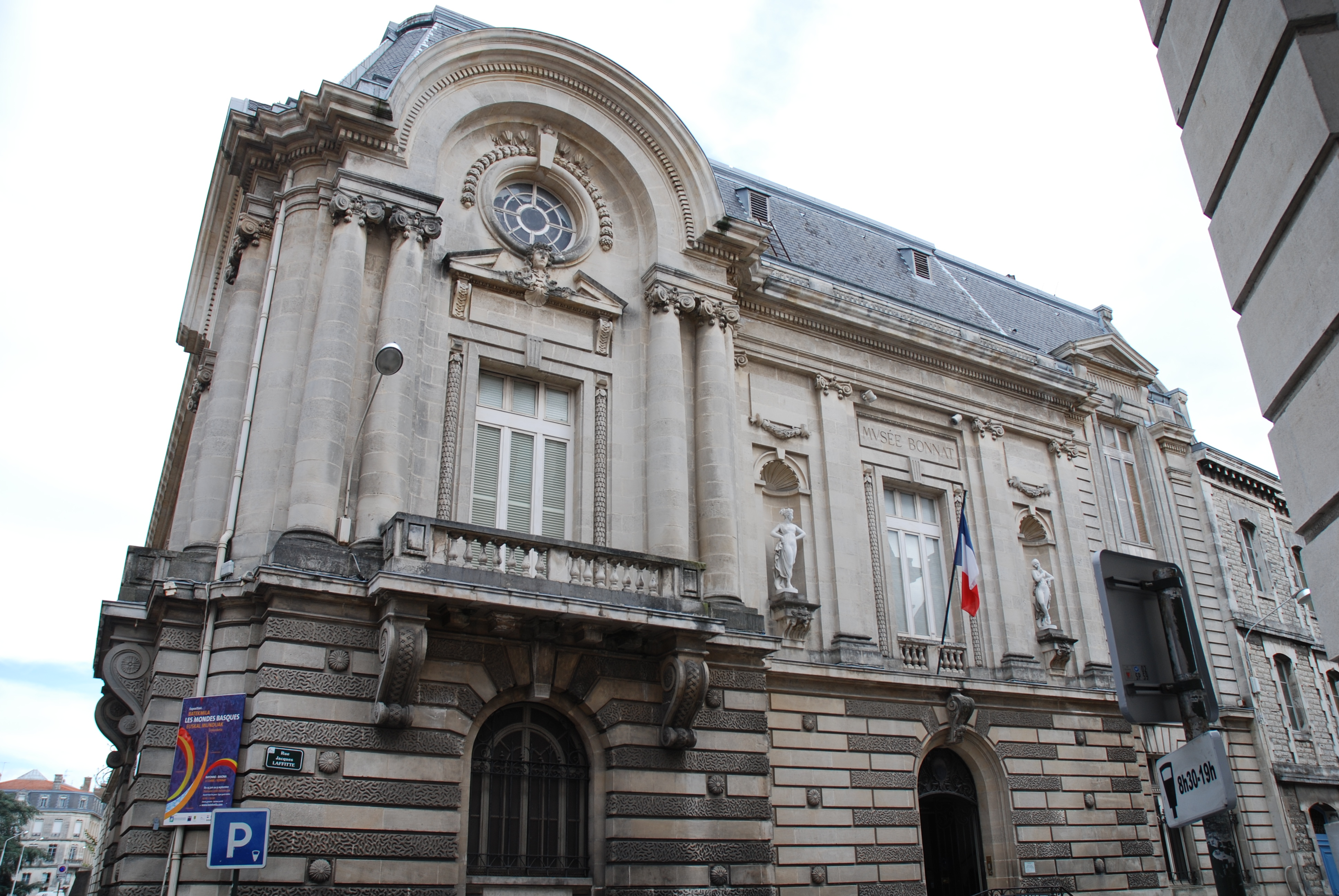 Bayonne, façade du musée Léon-Bonnat